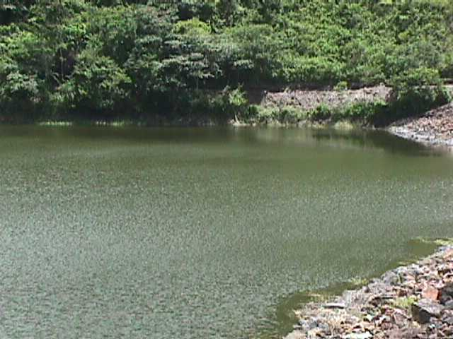 Embalse El Guamo estado Monagas - Venezuela (1998)